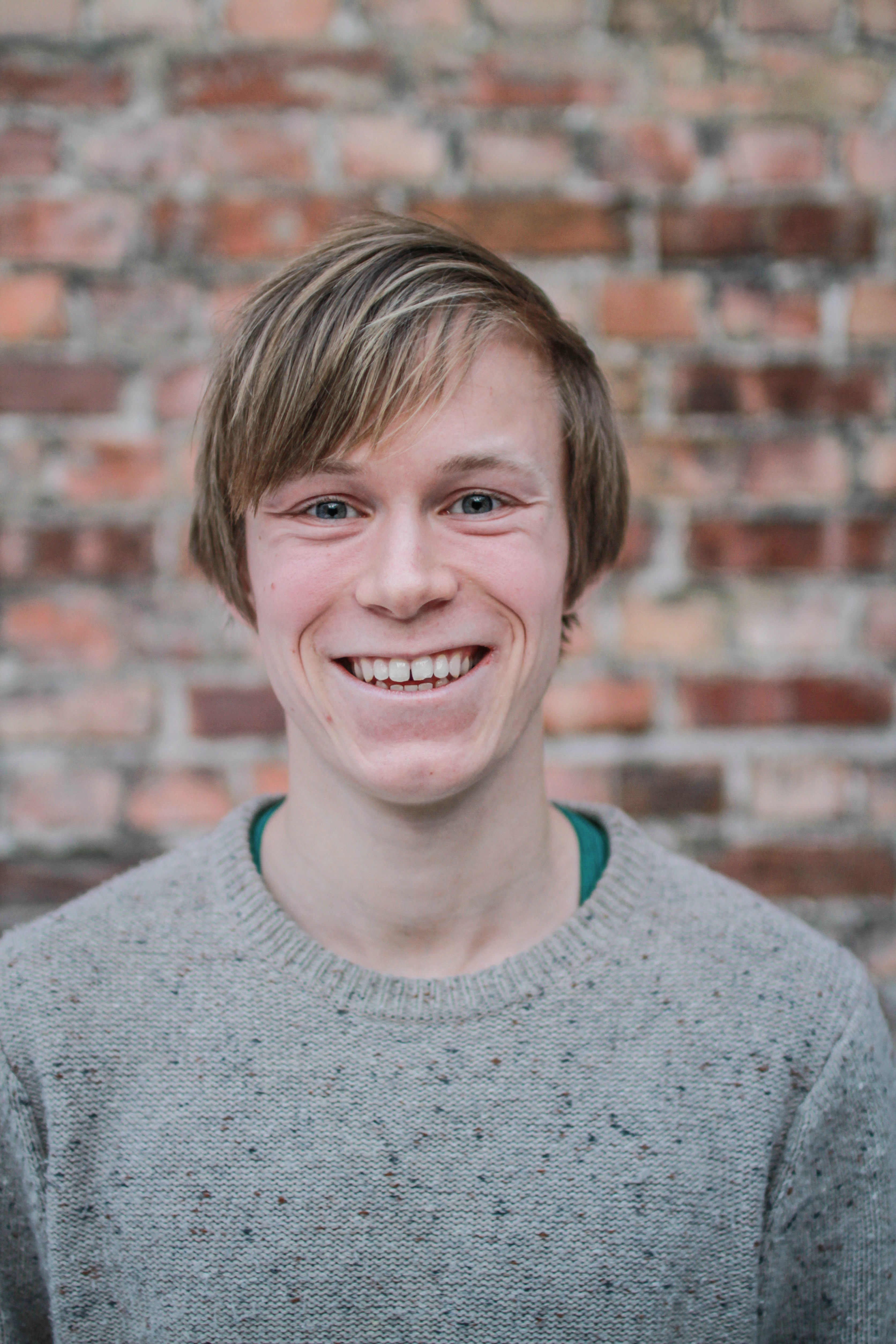 Bilde av Gaute Eiterjord foran murvegg.